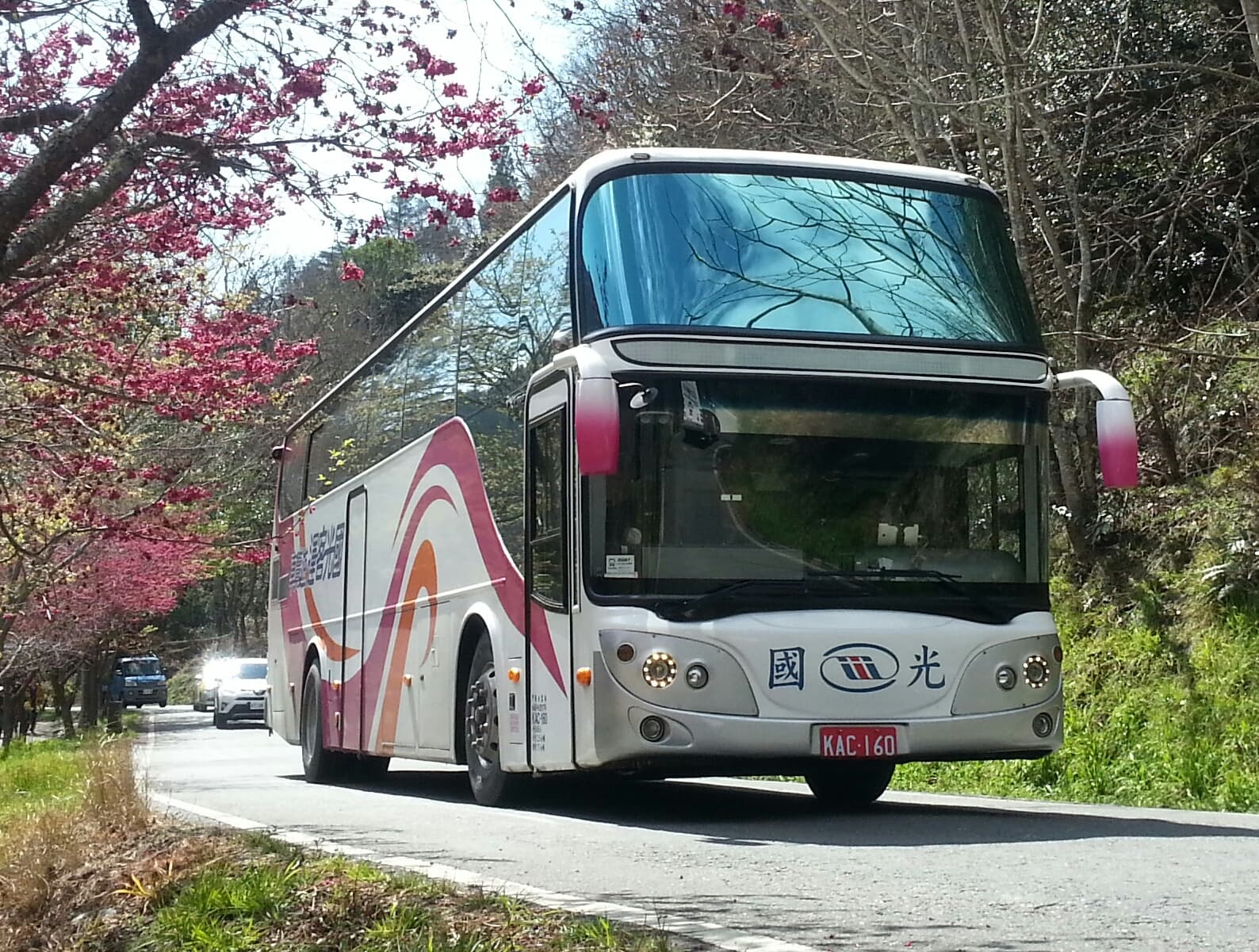 中文（台灣）: 國光客運2017年大宇TX4312遊覽車KAC-160。